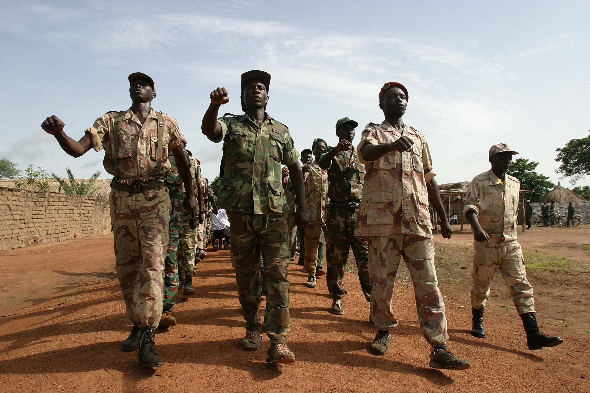 Rebellen im Norden der Zentralafrikanischen Republik.